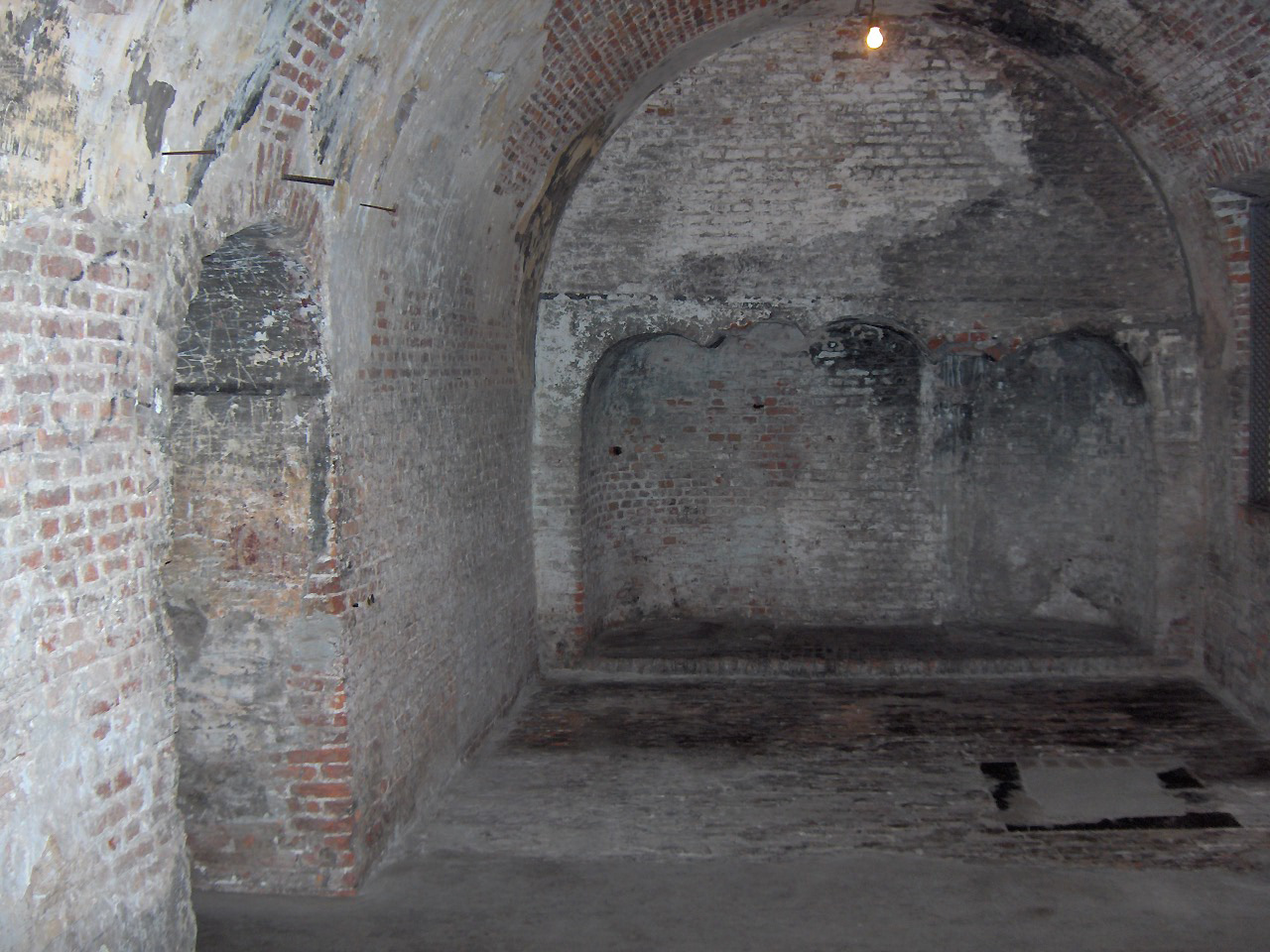 Kitchen in Fort Napoleon - Ostend, Belgium